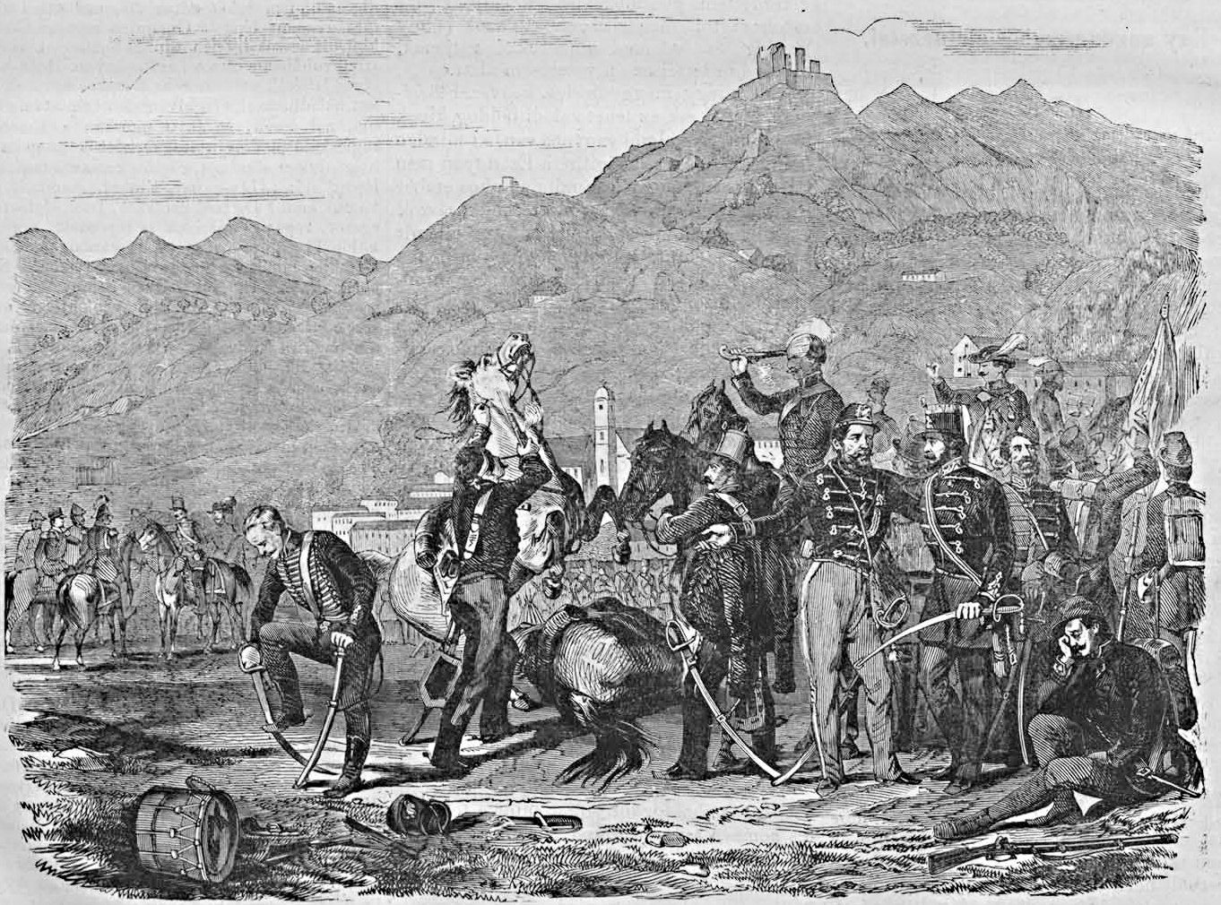 A világosi (szőlősi) fegyverletétel (1849. augusztus 13.) korabeli rajz alapján készített metszet (Vasárnapi Ujság, 1869. augusztus 15.)